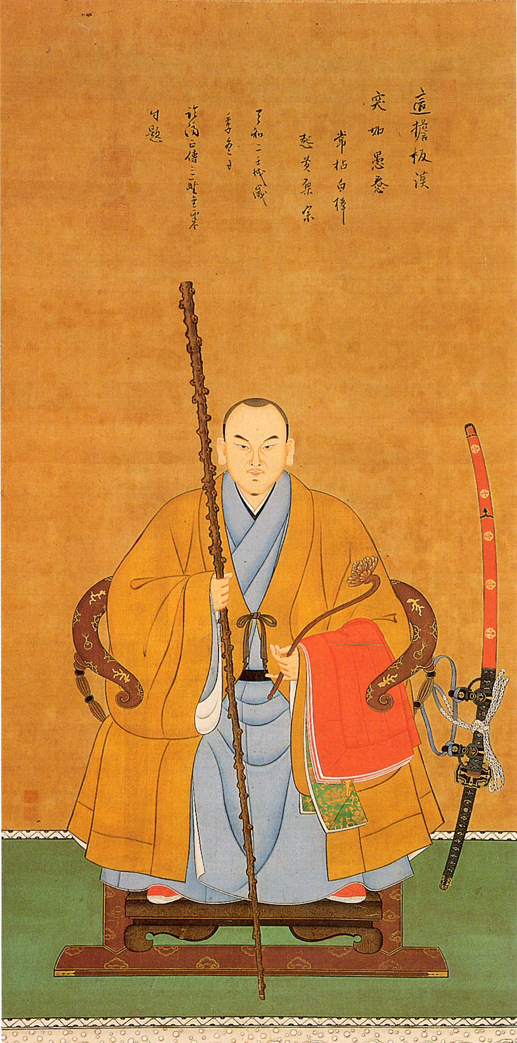 鍋島元武の肖像。